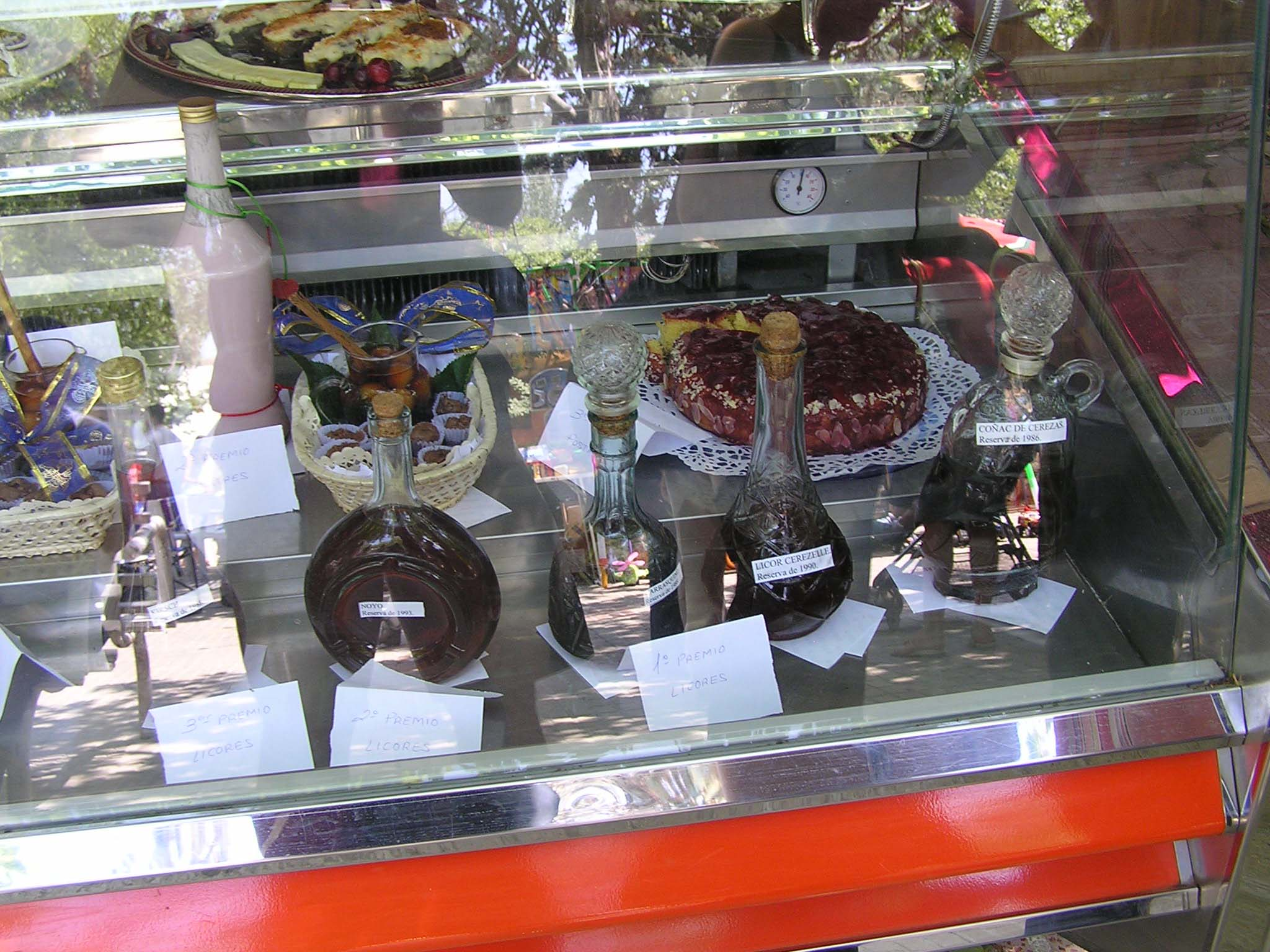 Licor de cereza,en Alcalá la Real, España.